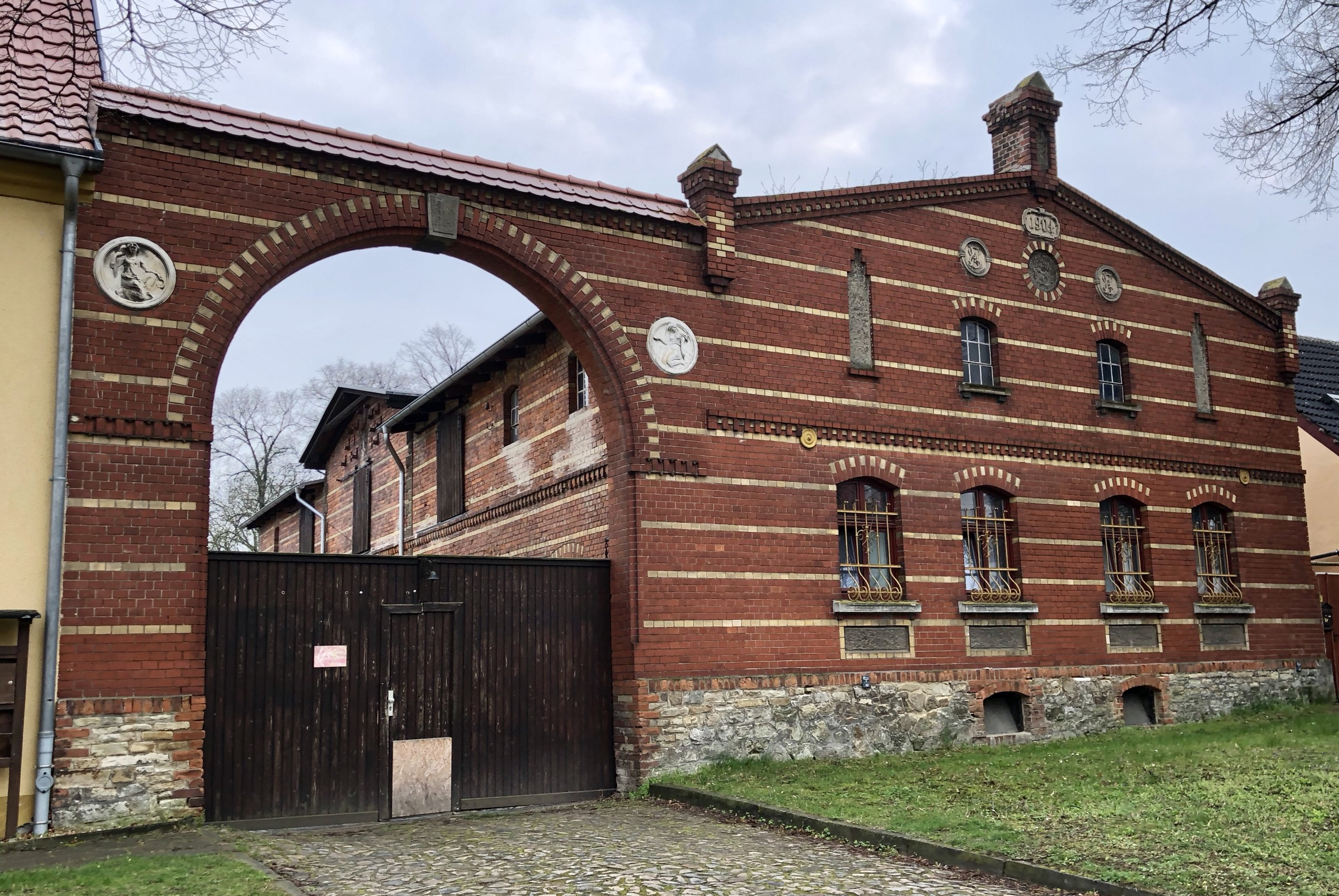 Etgersched Gut